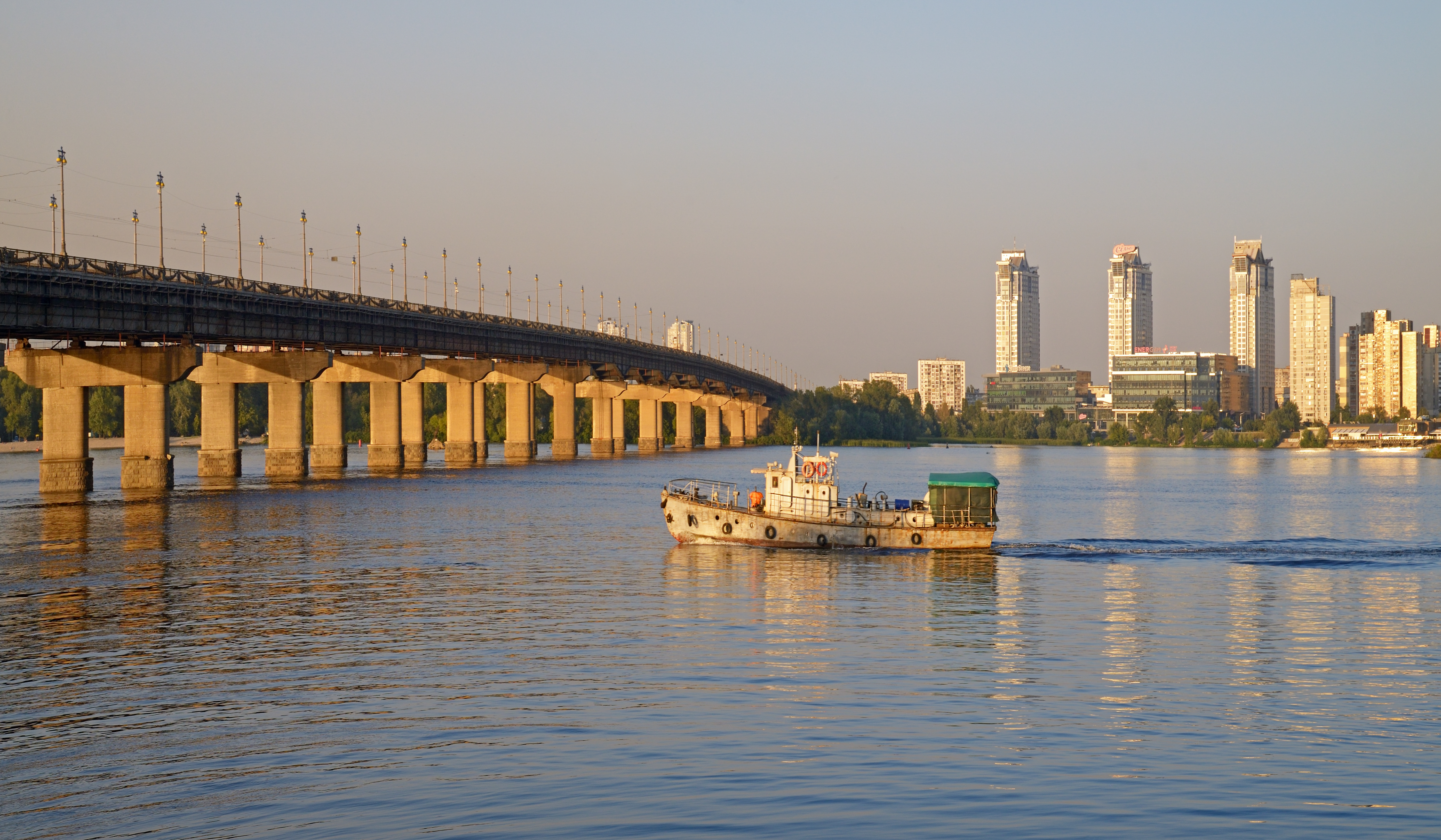 Paton Bridge, the Dnieper River and the Berezniaky neighbourhood at sunset. Kiev, Ukraine